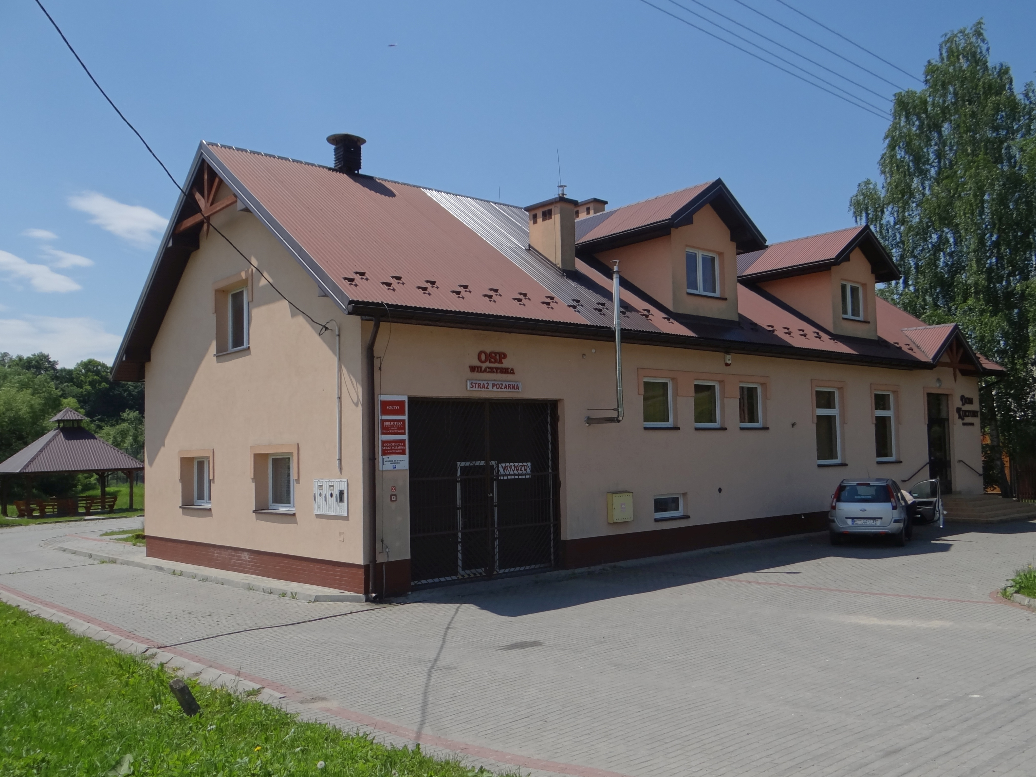 Remiza OSP i Dom Kultury w Wilczyskach